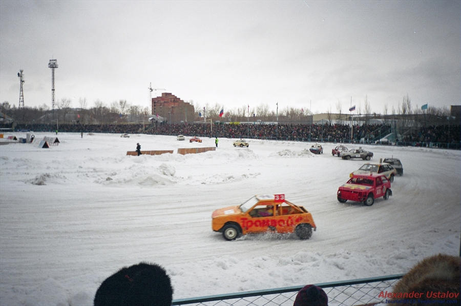 Гонки на выживание на стадионе "Строитель", Тольятти.